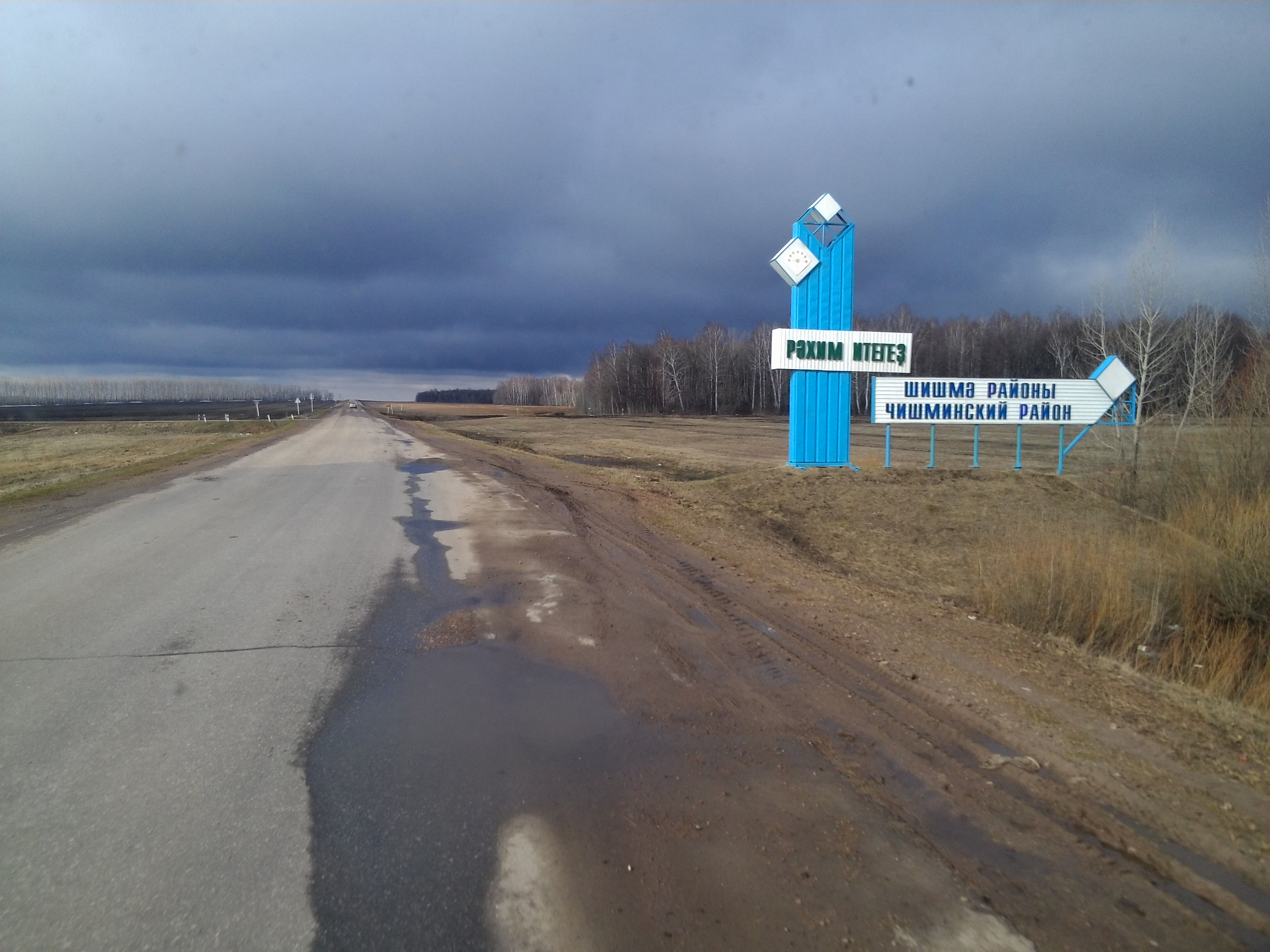 В'їзд до Чишминського району